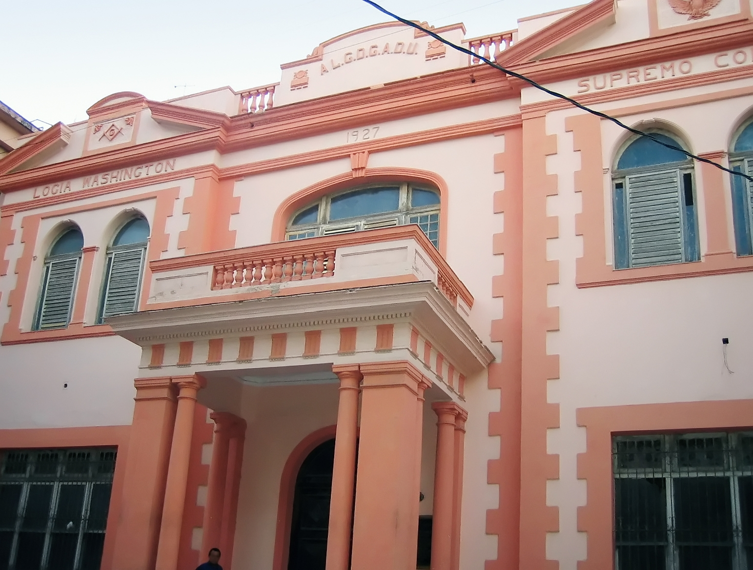 Building of the Washington Lodge in Cuba